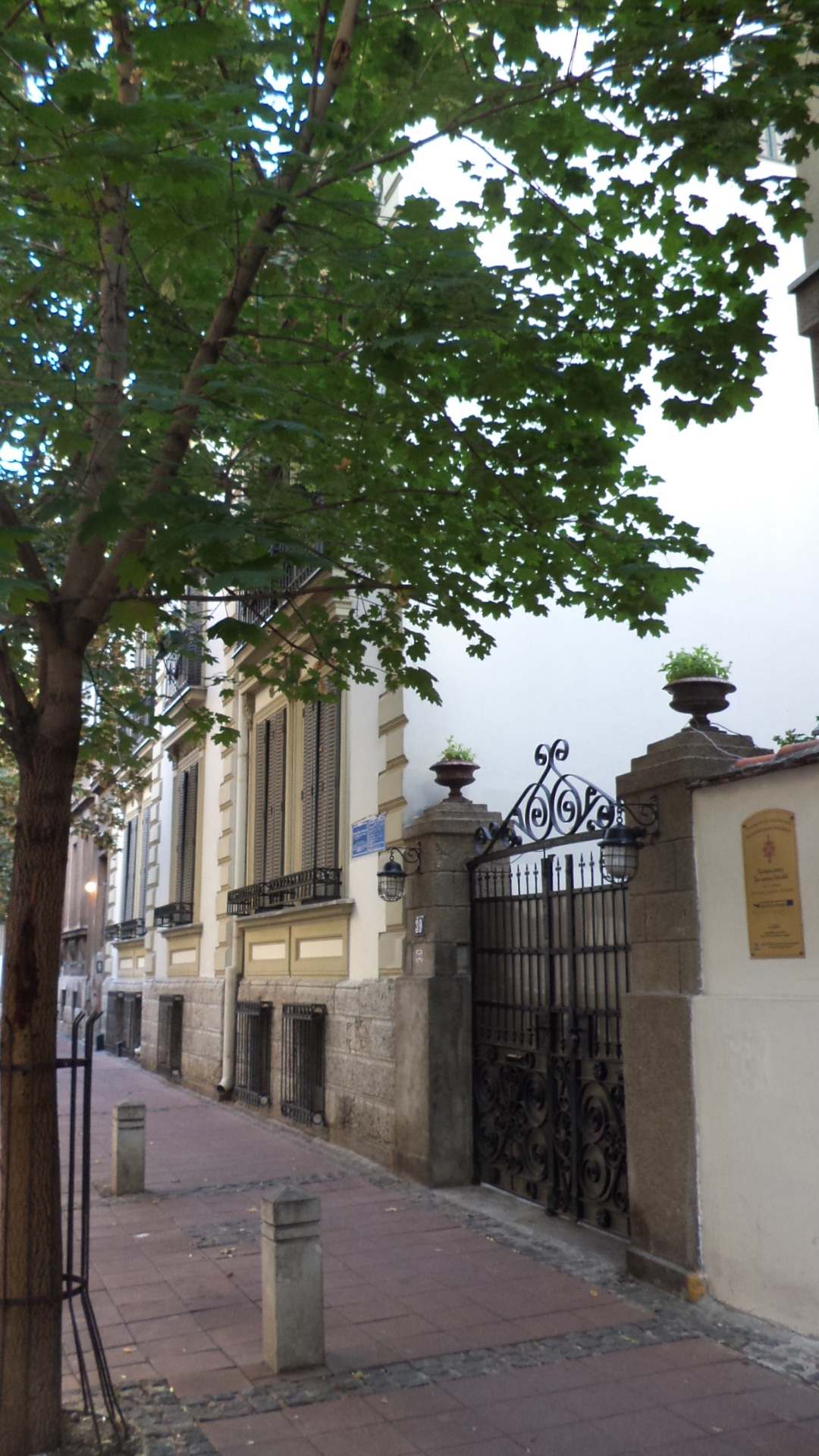 Дом породице Павловић